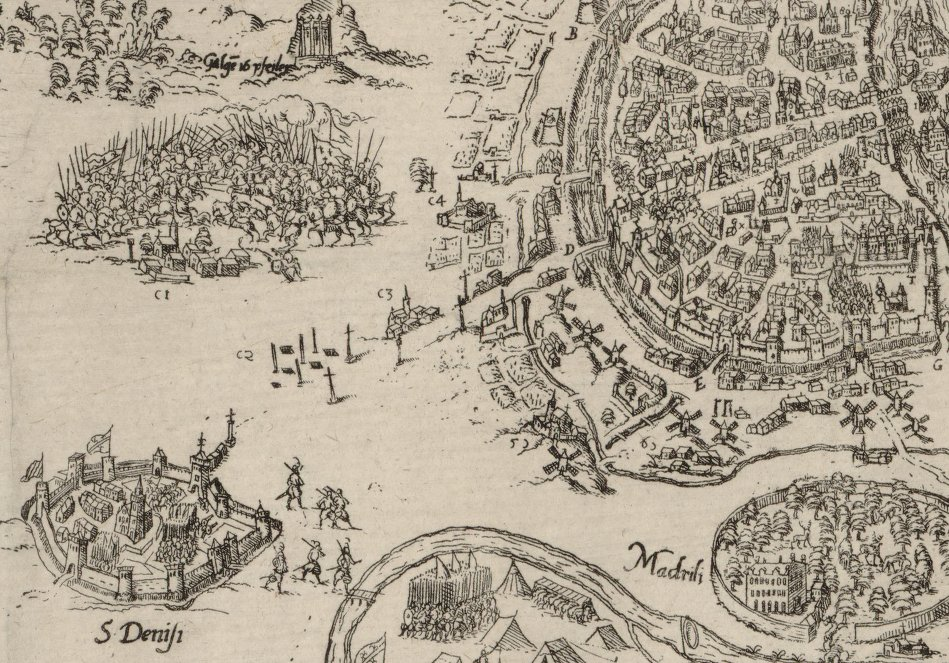 Détail d'une carte de Mathis Zundten, environ de paris, centrée sur l'Estrée. 1565